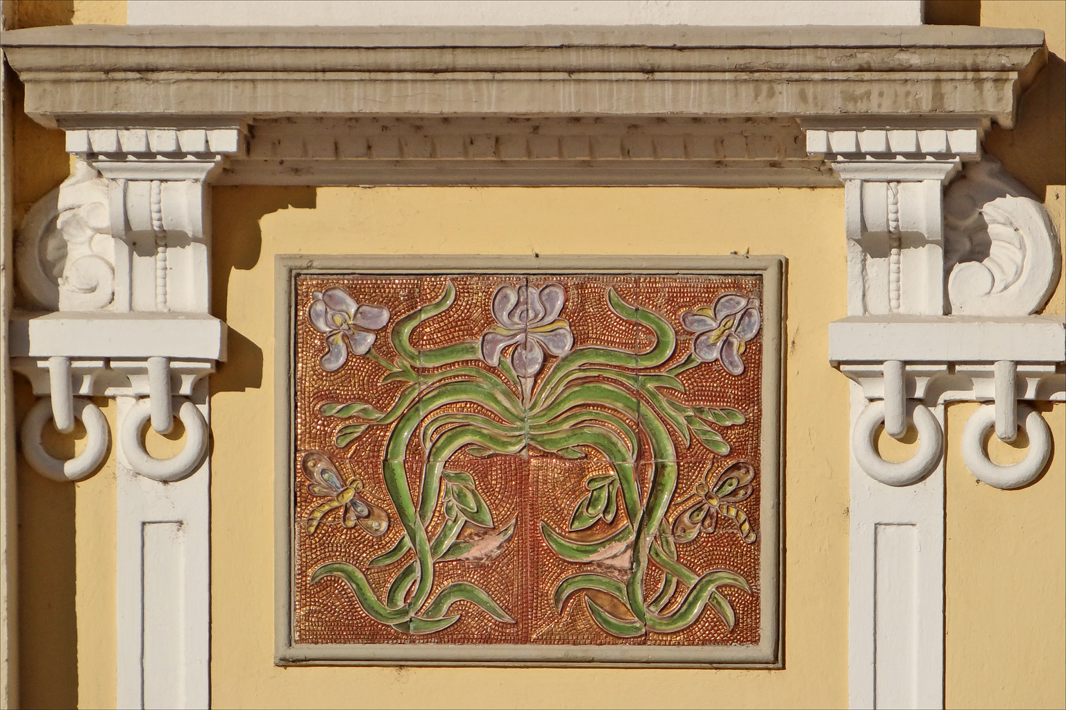 Décor de la façade du cinéma art nouveau : le Castillet Le Castillet est le plus ancien cinéma de Perpignan. Il a ouvert ses portes en 1911. Le bâtiment a été conçu dans le style "art nouveau" (moderniste) par l'architecte Montes sur commande de Joan Font, un catalan qui avait ouvert une salle de cinéma en 1906 à Barcelone. Les décors sculptés sont d'Auguste Guénot.